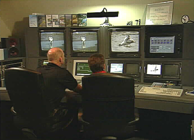 Im Studio erfolgt die Bearbeitung